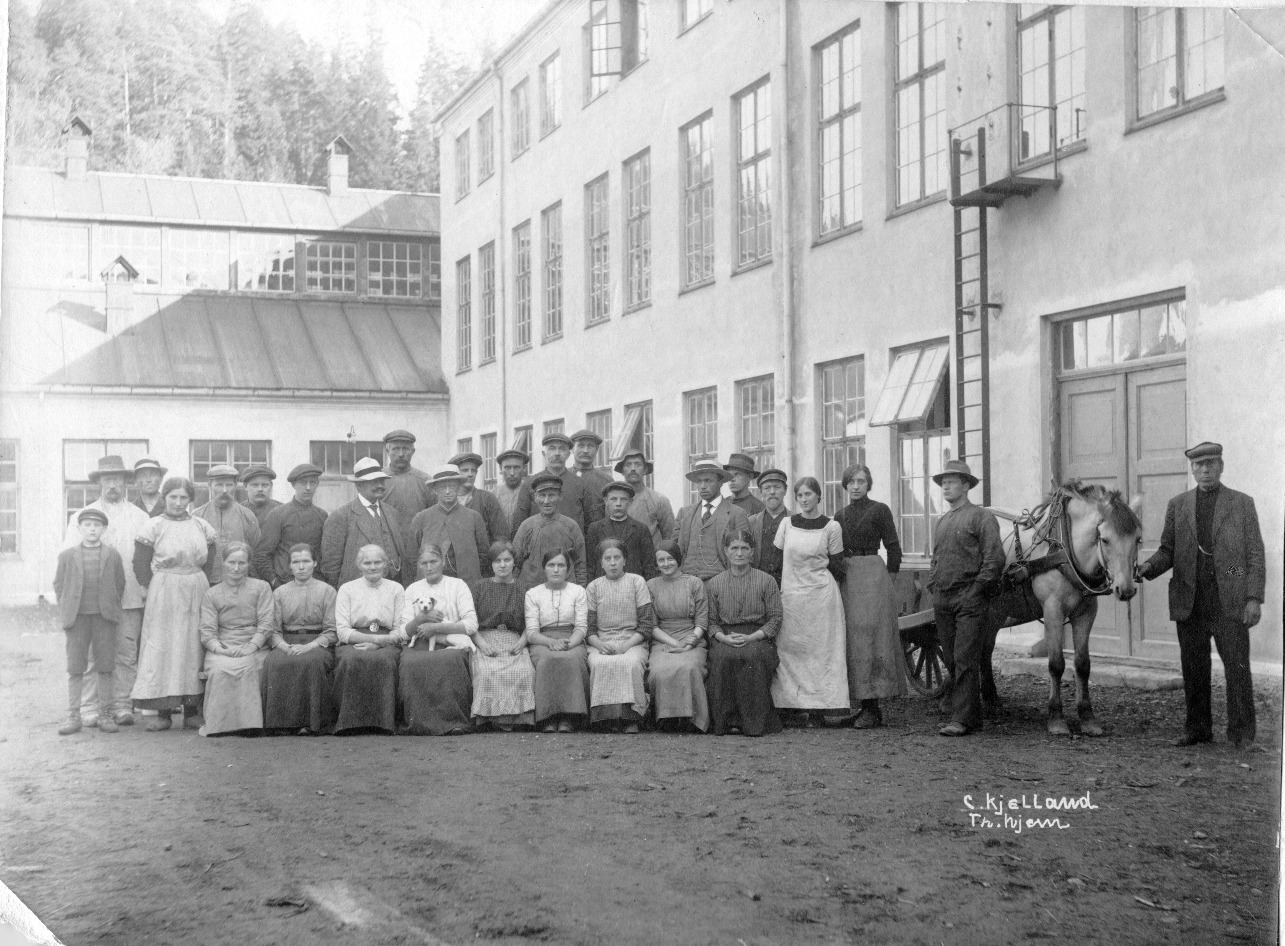 Arbeidere på De Forenede Ullvarefabrikker (D.F.U.) i Åsen i 1915. Til høyre er den nye fabrikkbygningen, som stod ferdig i 1914. Se bl.a. Einar Weiseths bok "Hoplavassdraget og Åsenfjorden" (Levanger 2000). Fotograf / Photographer: C. Kjelland, Tr.hjem Fotoeier / Photo owner: Åsen Museum og Historielag Digitalisering / Digitizing: Arne Langås Foto-ID / Photo ID: 001-0394 Oppdatert / Updated: 18. apr. 2015 Har du utfyllende opplysninger? Legg gjerne igjen en kommentar nedenfor eller send e-post til . | Do you have additional information? Please leave a comment or send an e-mail to .